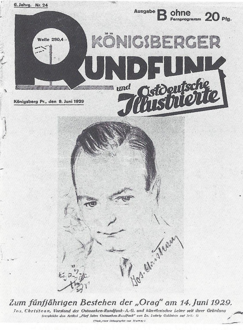 Programmheft des Königsberger Rundfunks